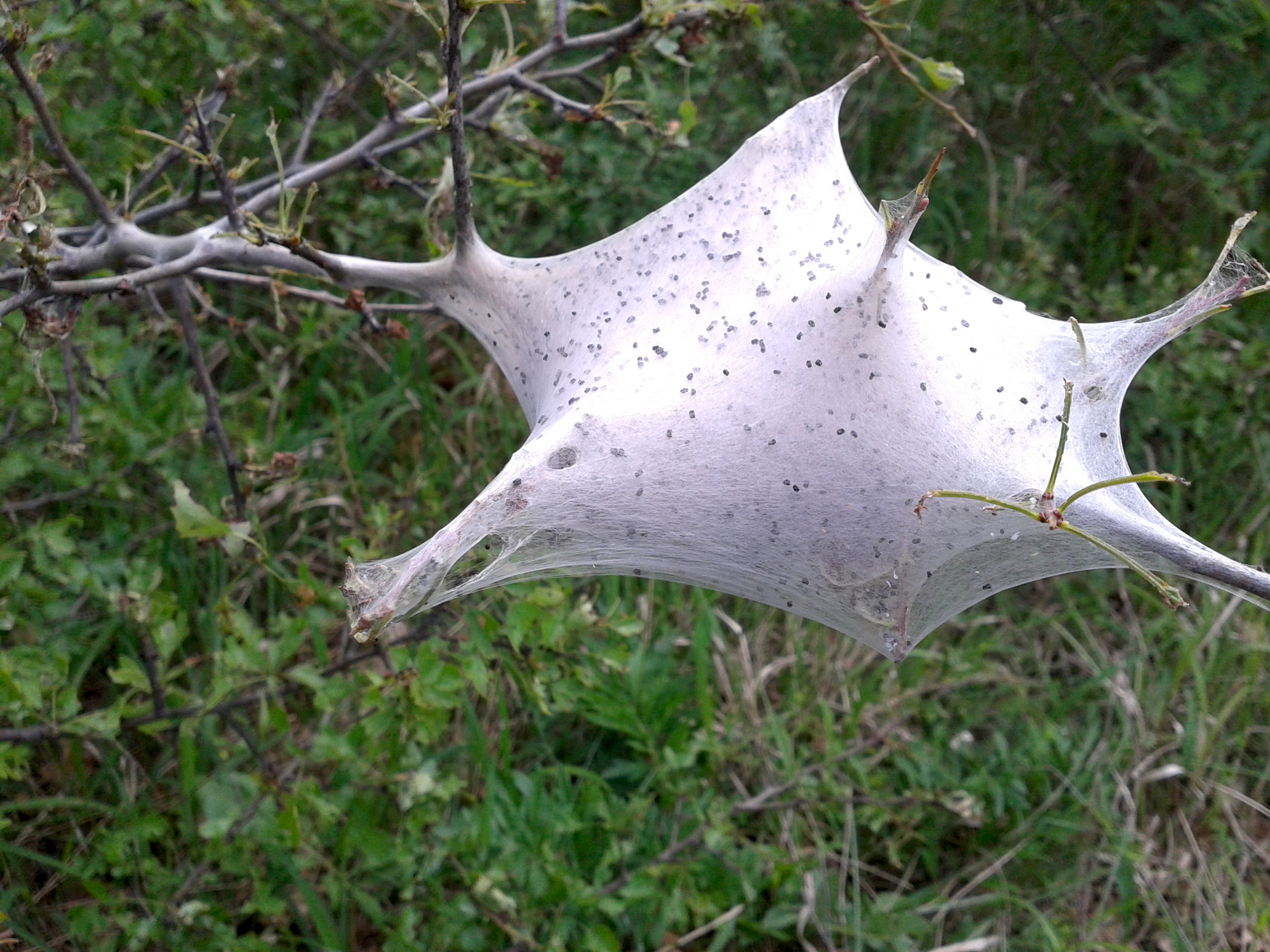 Gespinst des Frühlings-Wollafters (Eriogaster lanestris) Habitat: halboffene, trockene Gebüsche Futterpflanze: Weißdorn